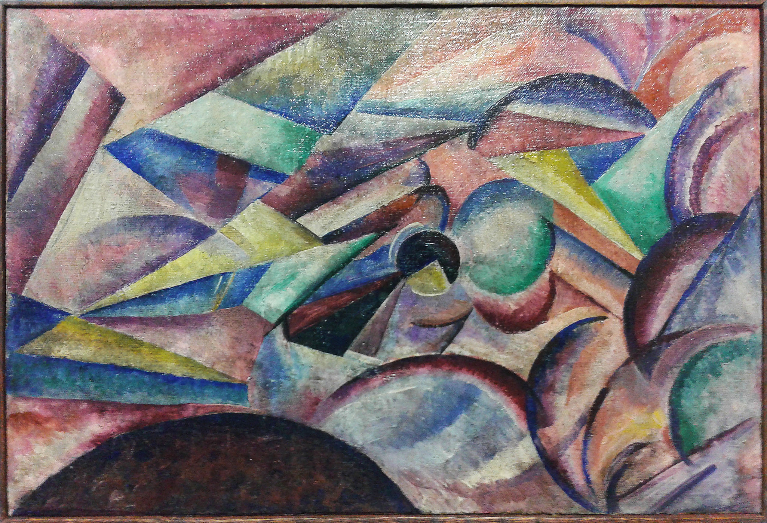 Олександр Богомазов. Космос, 1910-ті. Полотно, олія